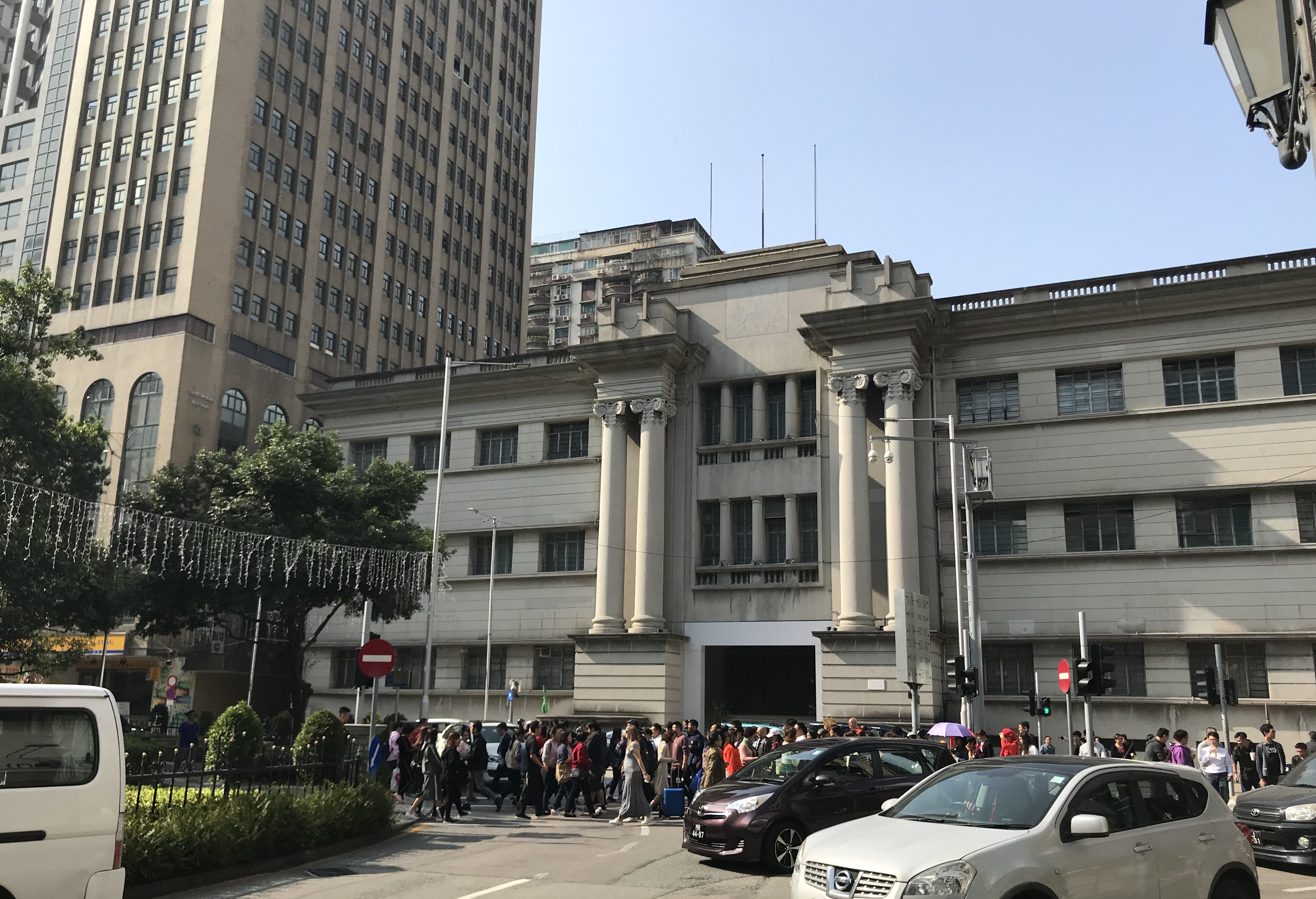 中文（台灣）: 澳門舊法院大樓，2018年